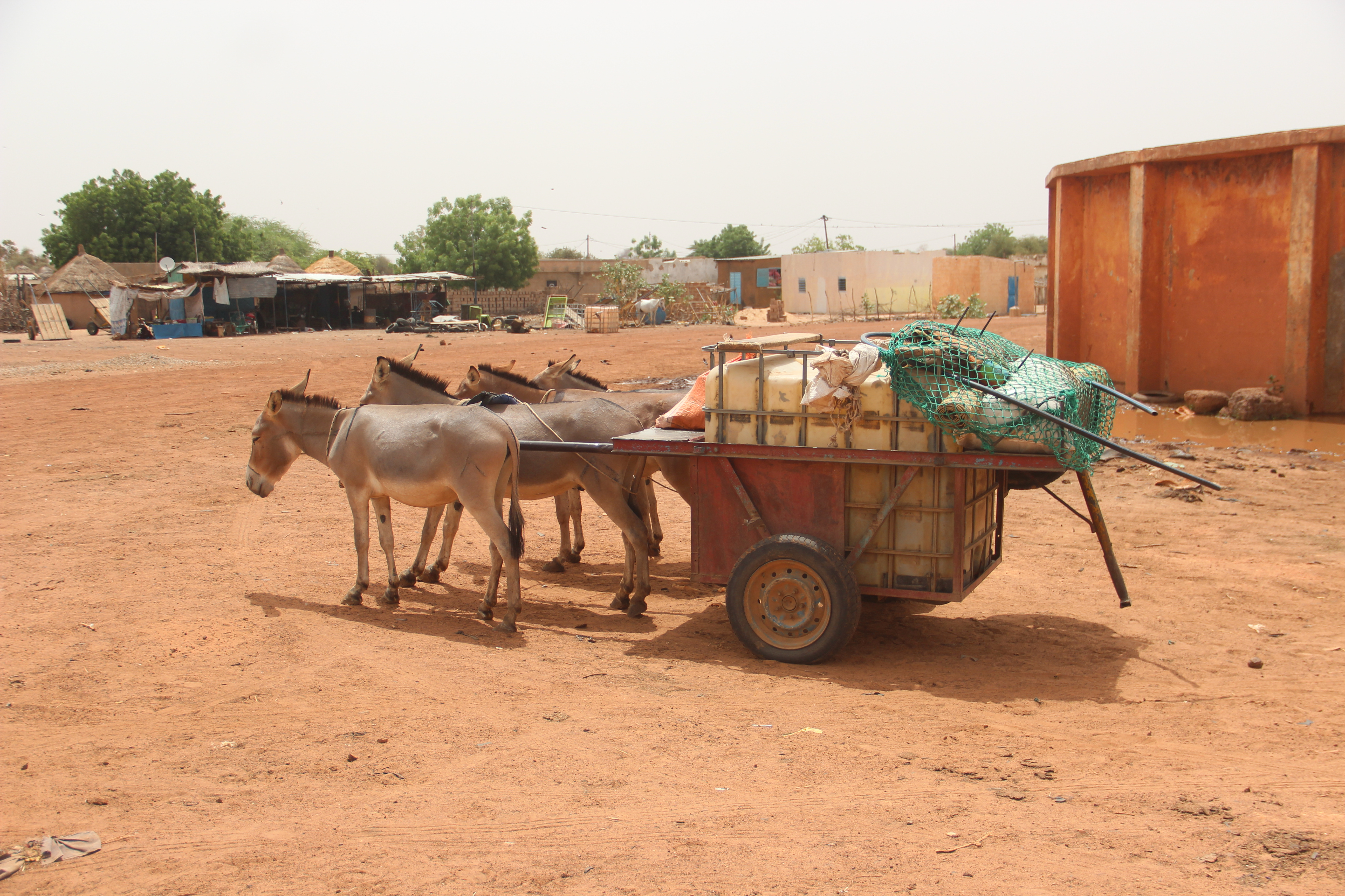 Charrette tirée par des ânes à Younoufere (département de Ranérou-Ferlo, Sénégal). This is an image with the theme "Africa on the Move or Transport" from: Senegal